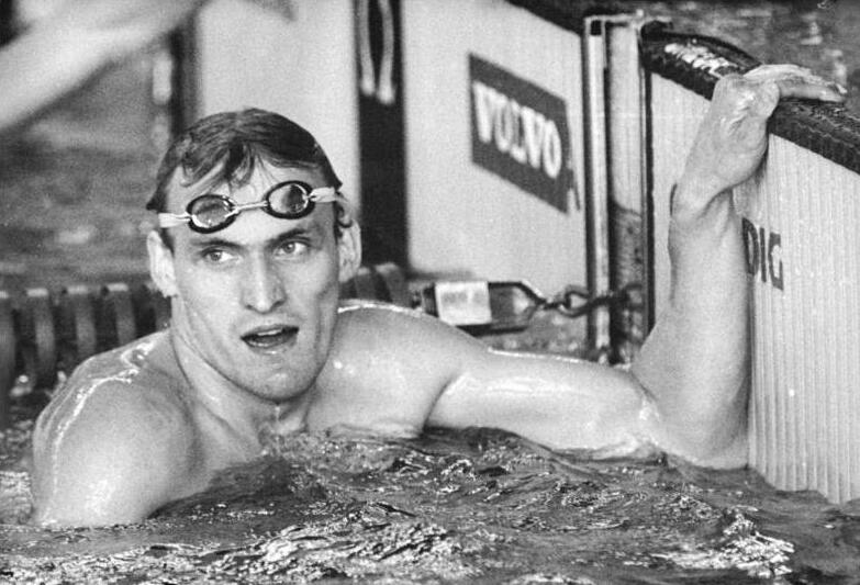 Schwimmer Dirk Richter ADN-Hiekel 24.5.90 Dresden: 41. DDR-Meisterschaften im Sportschwimmen- Dirk Richter vom Dresdner Sportklub (DSC) konnte über die Distanz 200-Meter-Rücken in 2:01,51 Minuten ein Comeback feiern. Abgebildete Personen: Richter, Dirk: Schwimmsportler, DDR